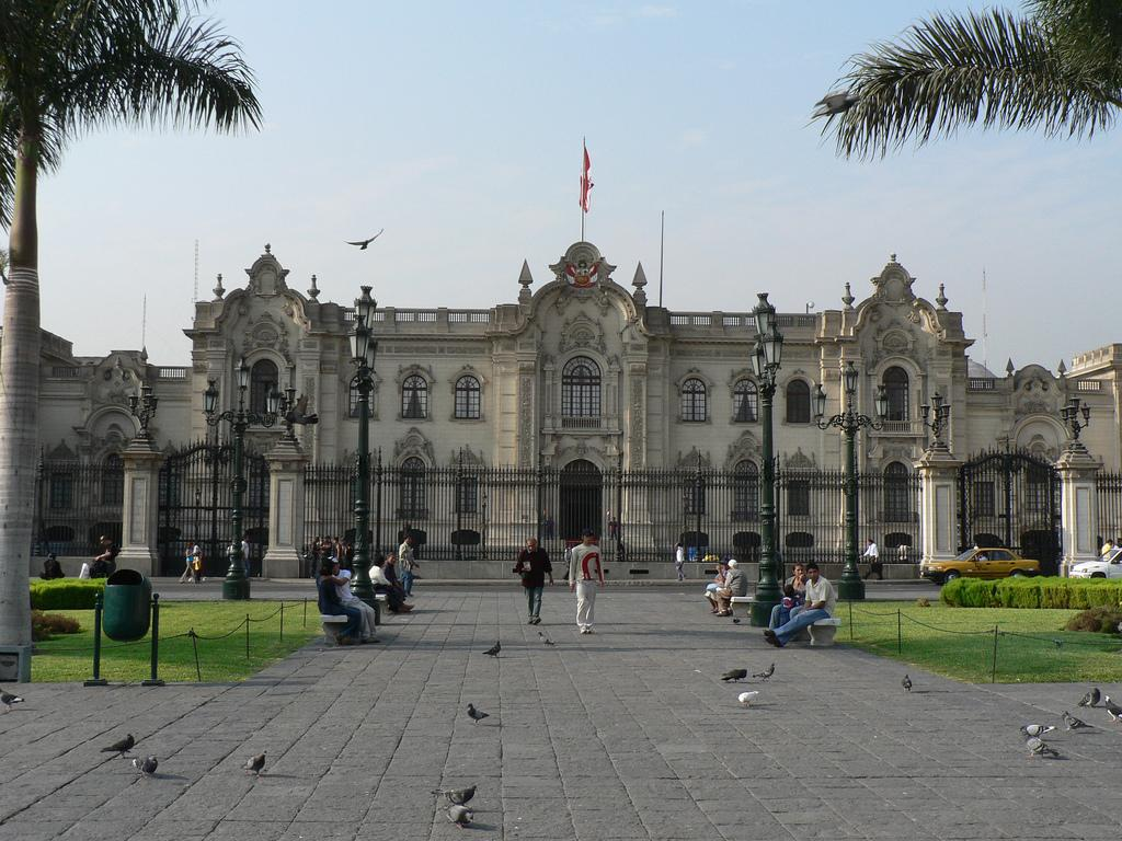 LIMA